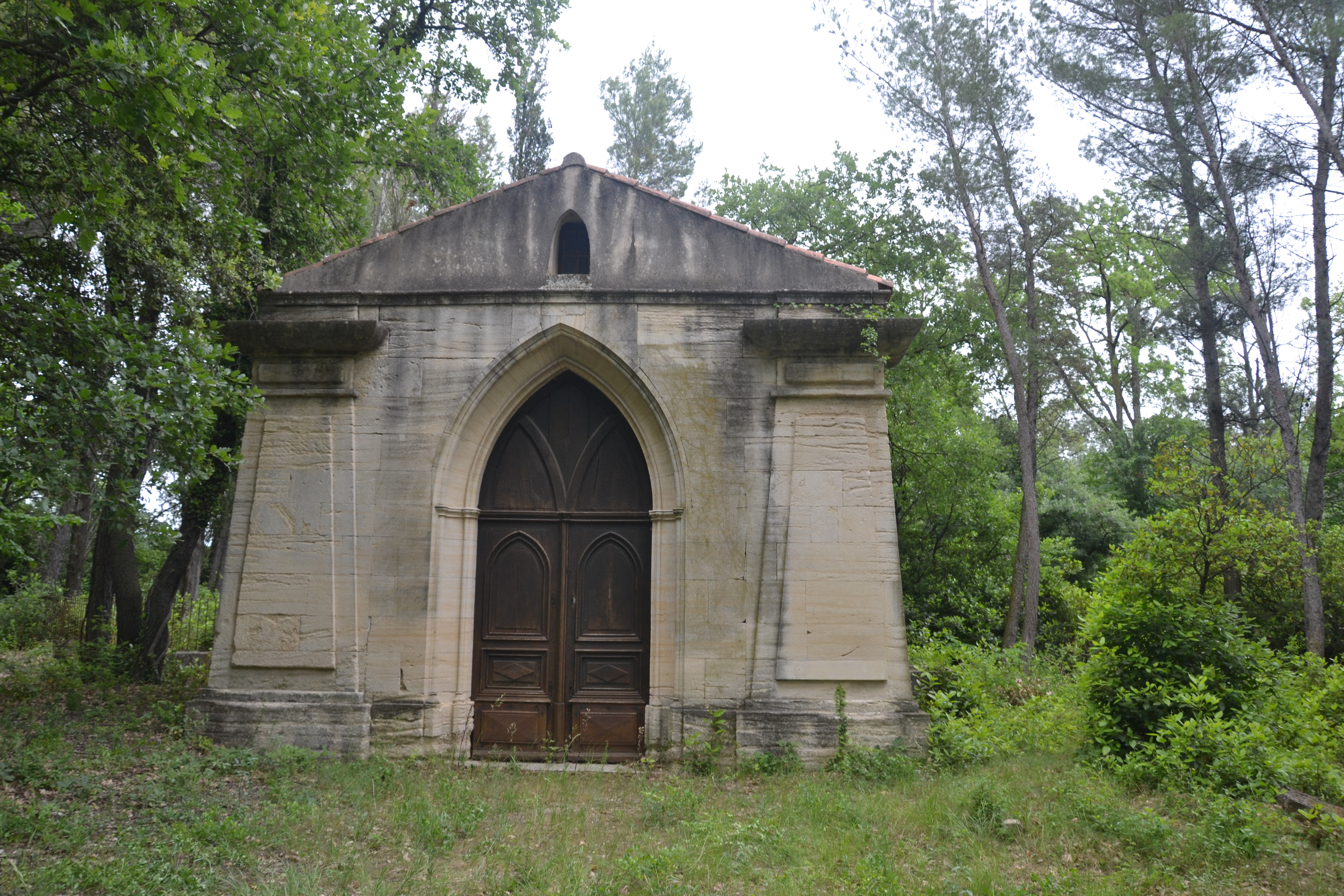 cimetière juif de Carpentras : dépositoire